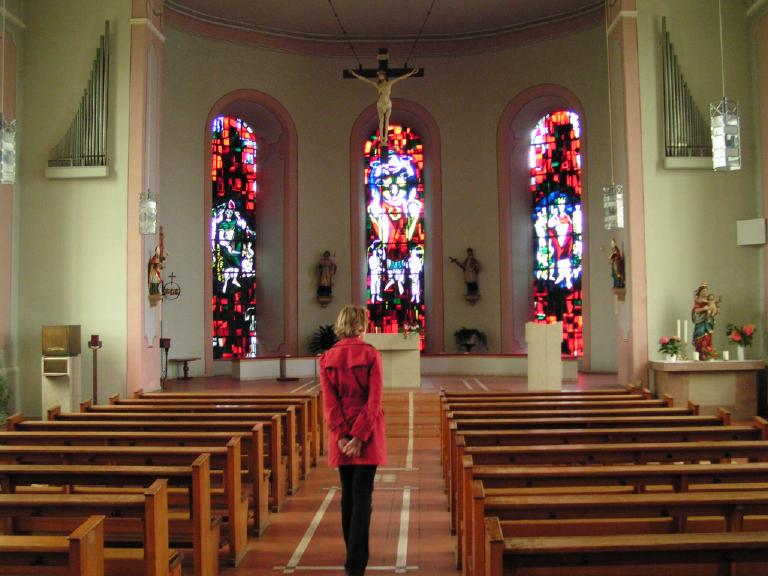 Fernwerk und Altar der Kirche St Albanus Schillingen